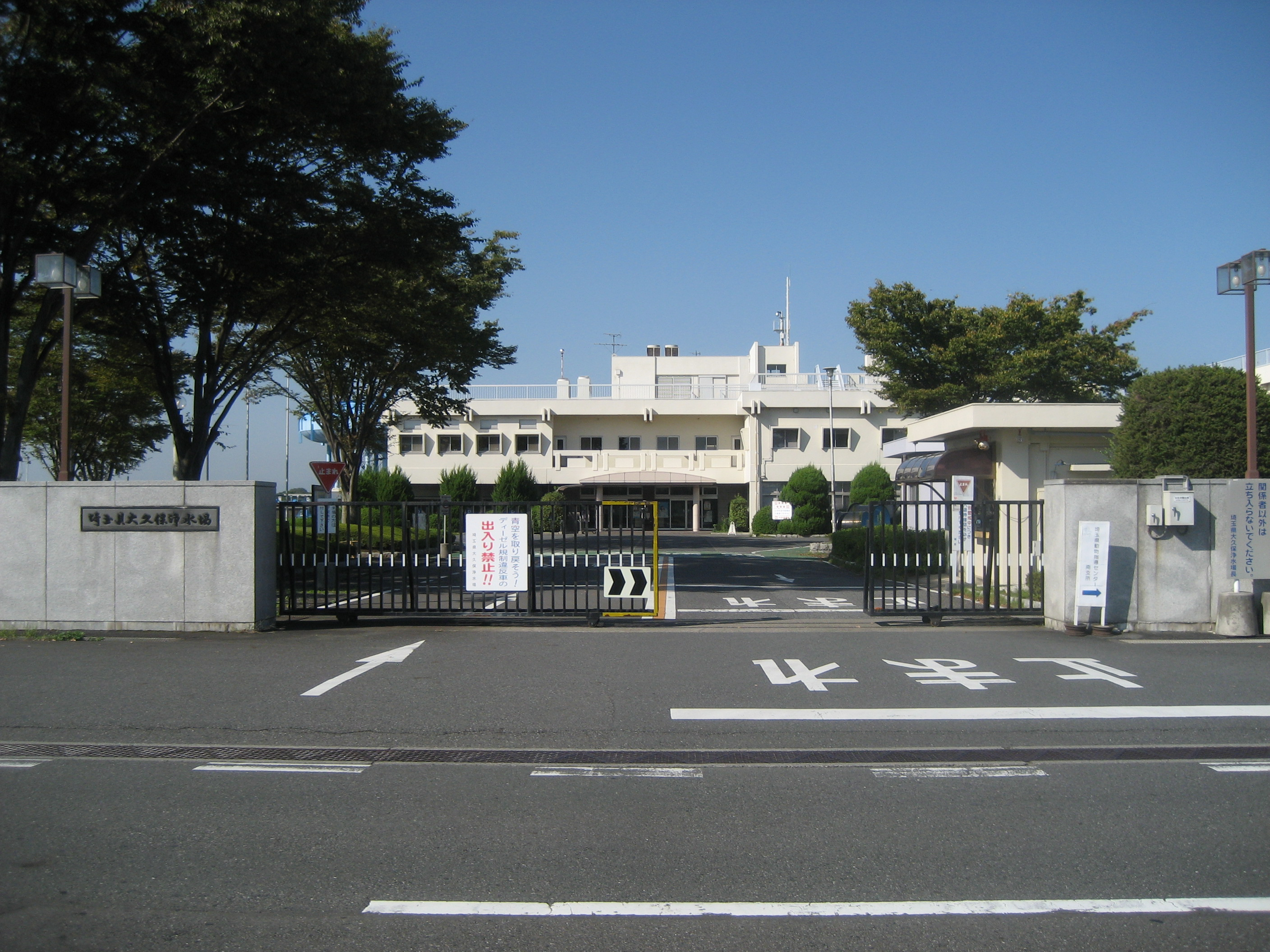 埼玉県さいたま市桜区にある埼玉県企業局大久保浄水場（正門付近を撮影）